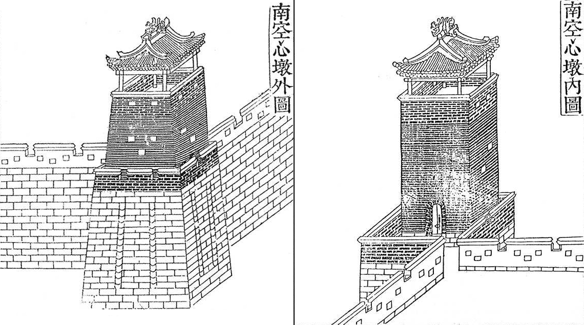 Aufenthaltsturm im Süden: Feldseite und Innenseite.